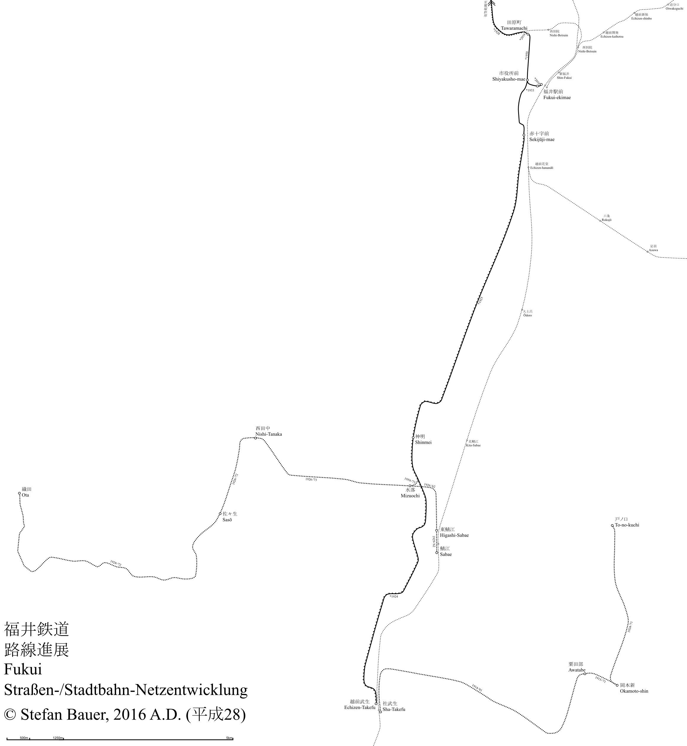 福井鉄道の路線進展図